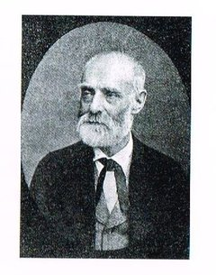 Karl Wilhelm von Martini, Romanautor